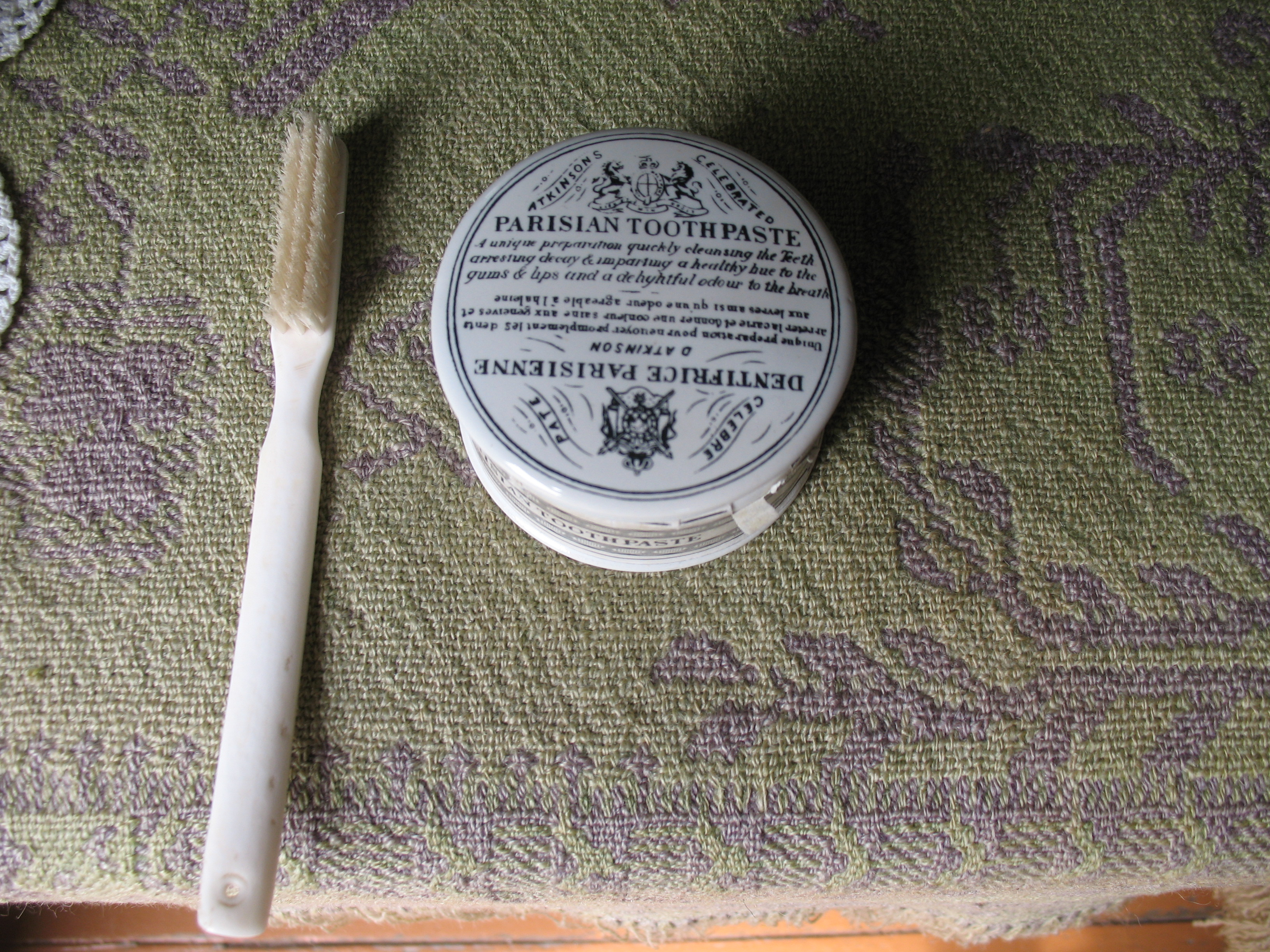 Zahnbürste und -paste im Riel-Haus in Winnipeg